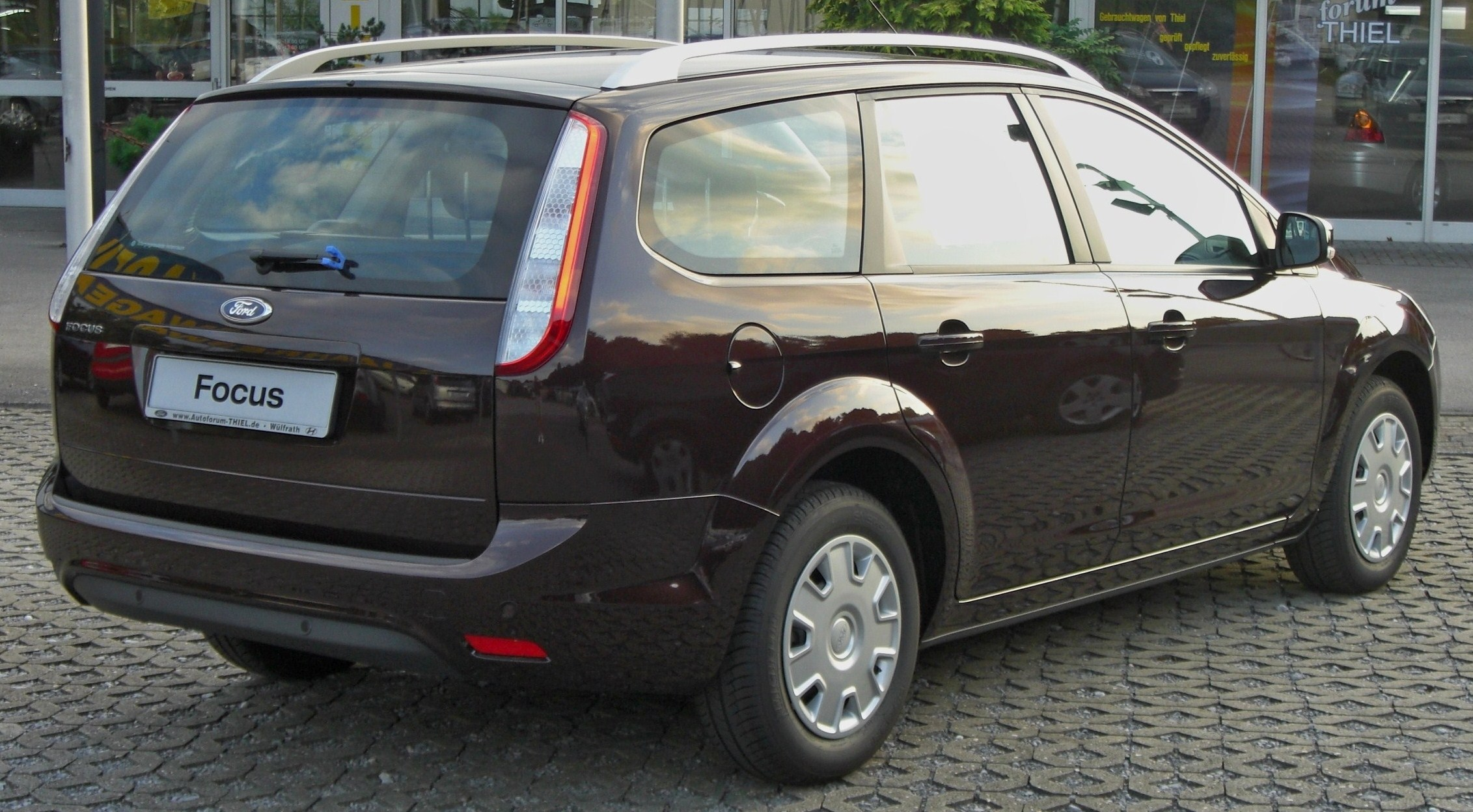 Ford Focus MkII Turnier